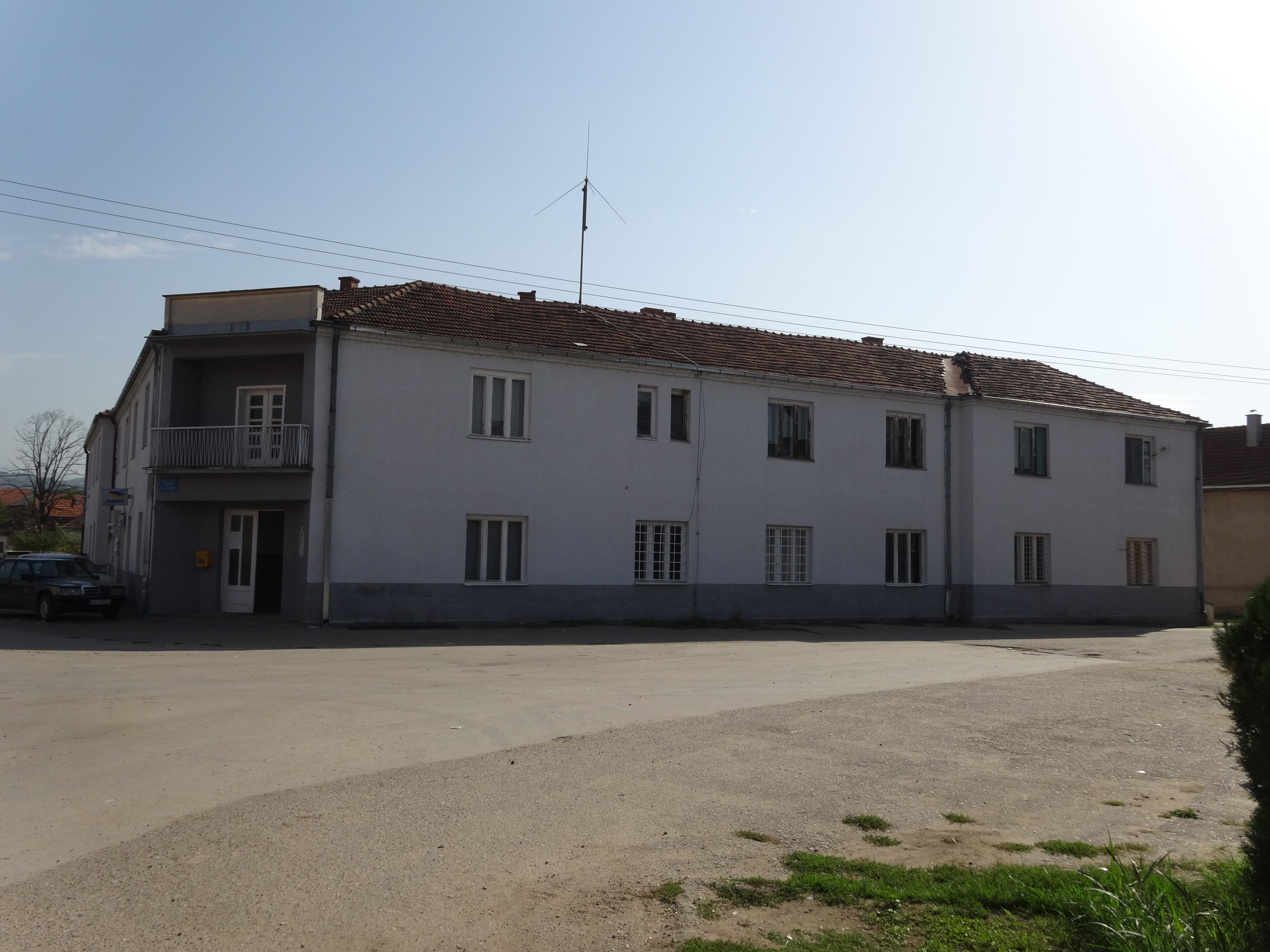 Manojlovce, Leskovac, Mesna zajednica